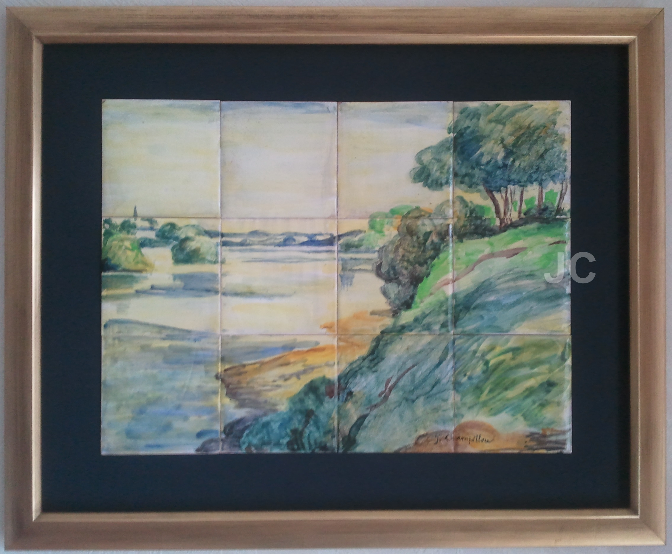 Le Loire à la Chapelle Saint Mesmin Plaques 12 carreaux de faïence peints à l'oxyde Jeanne Champillou